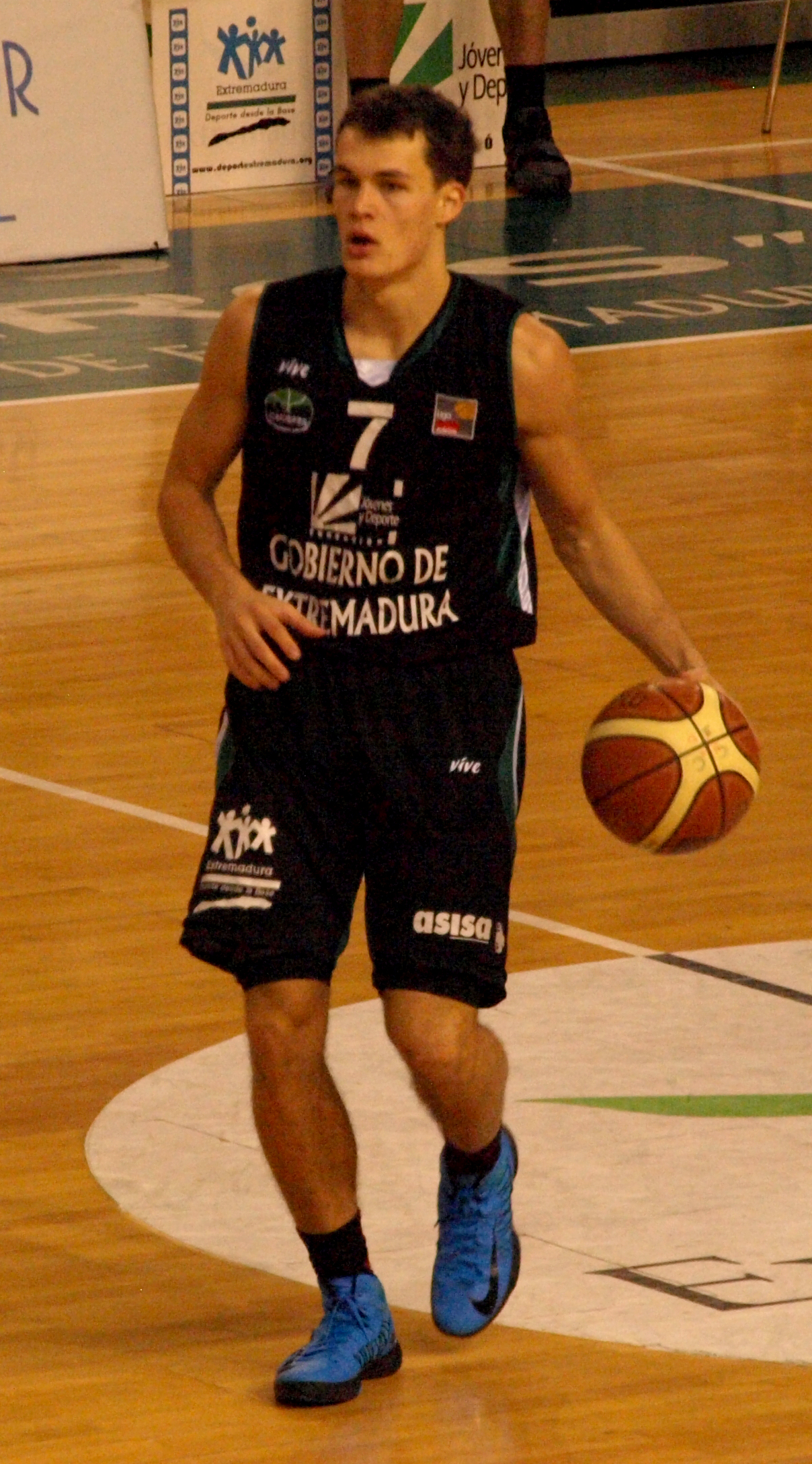 El jugador de baloncesto británic Devon Van Oostrum, disputando un partido con su club, el Cáceres Ciudad del Baloncesto en enero de 2013